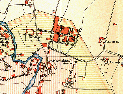 Kart over Sandaker, 1887